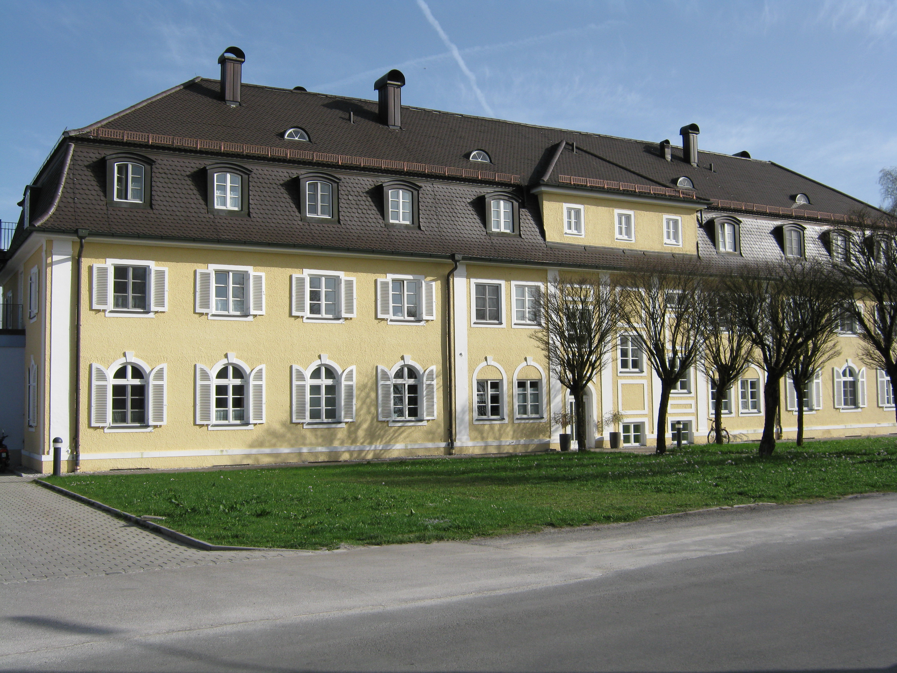 Städtisches Altersheim Penzberg Zugspitzstraße 3; neoklassizistischer Bau mit Mansardwalmdach, errichtet 1925/26 von Architekt Josef Linder.